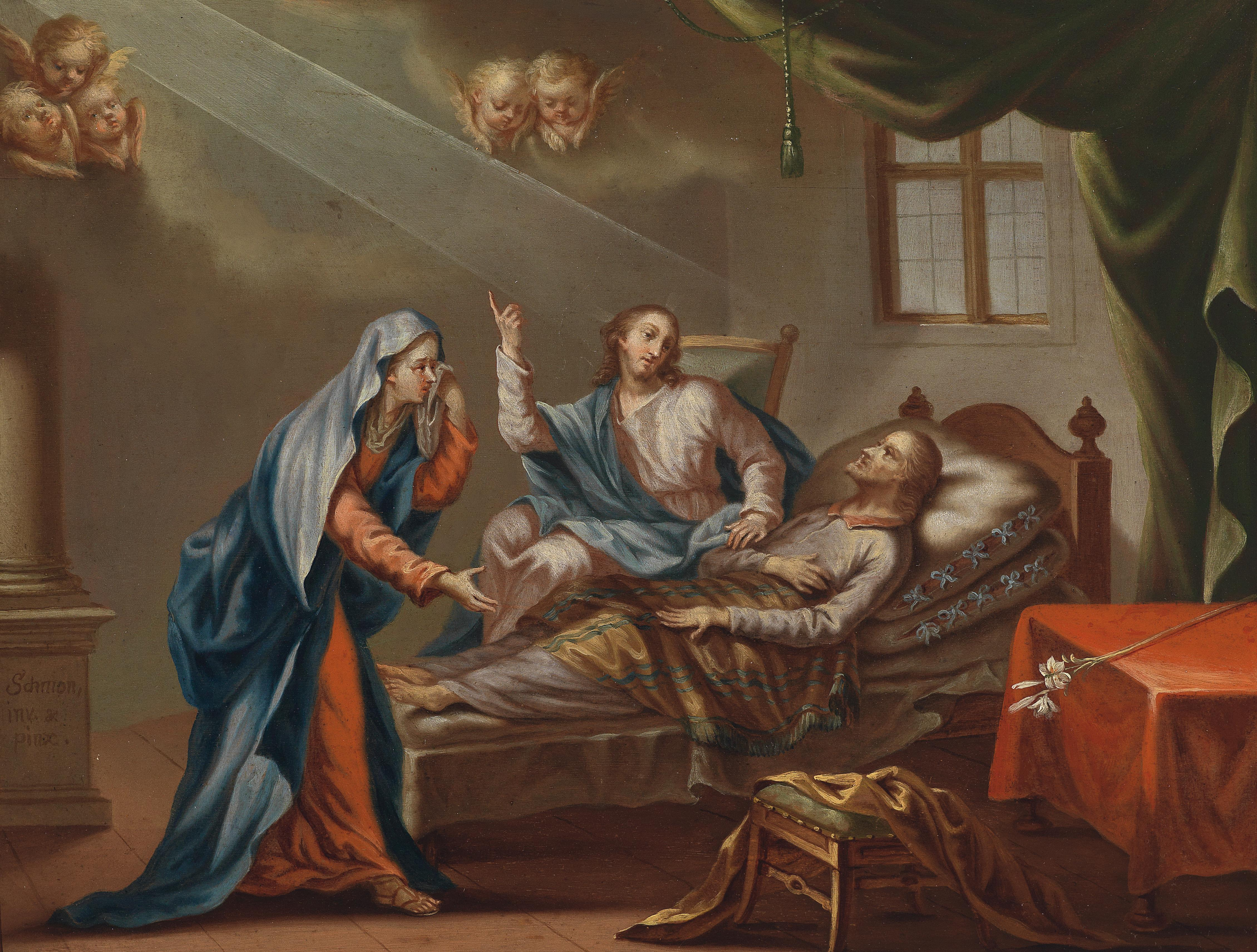 Der Tod des hl. Joseph, Öl auf Holz, 21 x 26,8 cm